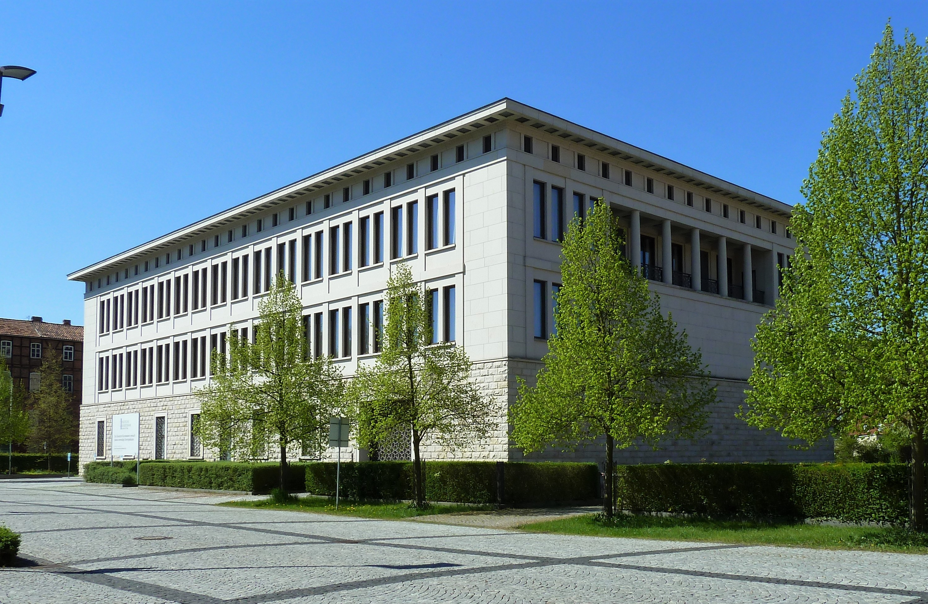 Bundesbankfiliale in Meiningen, Architekt: Hans Kollhoff.